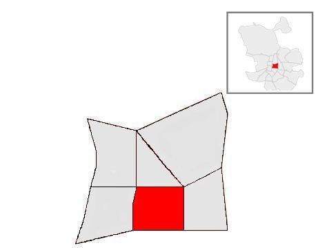 Mapa del barrio de Goya en Madrid